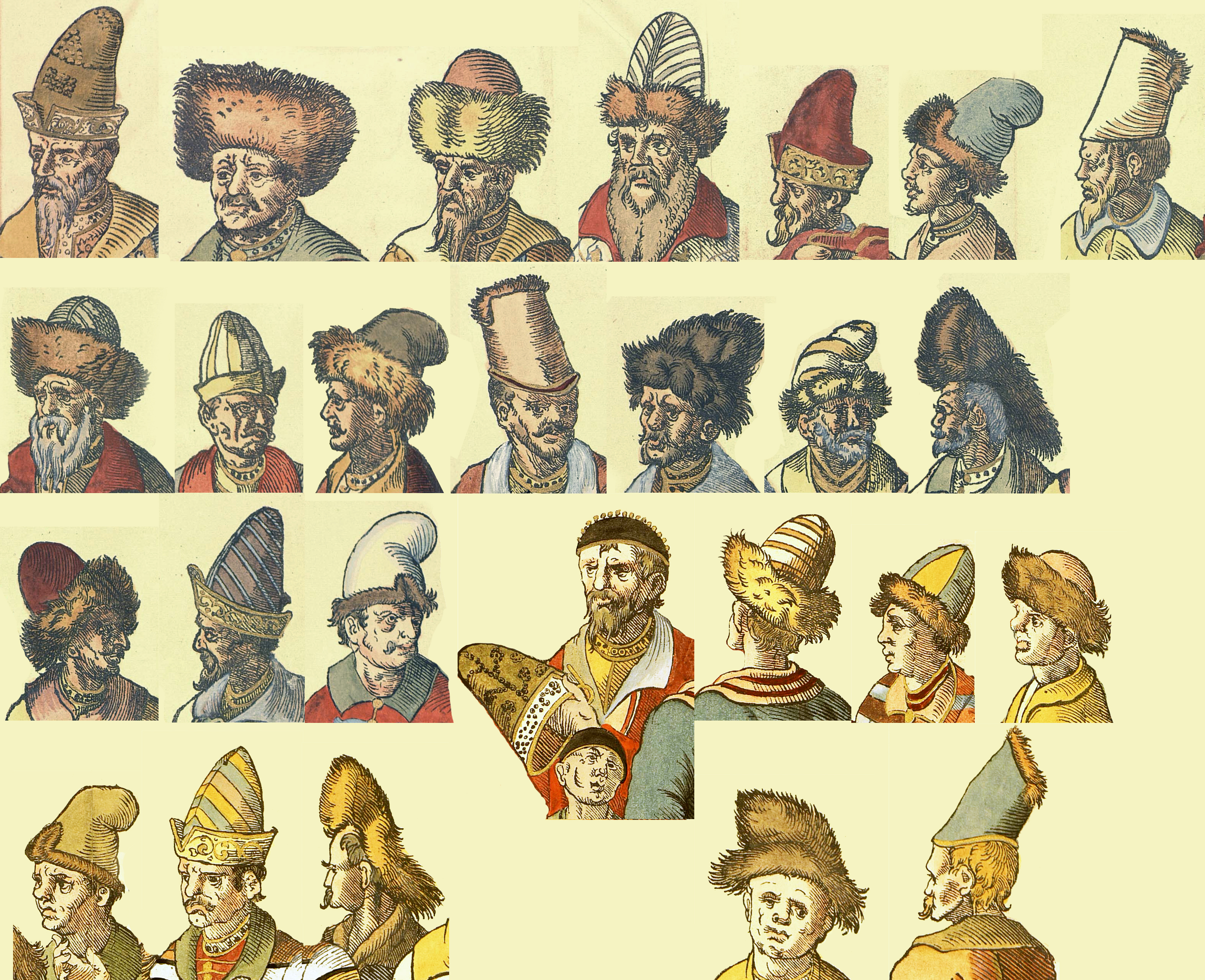 Русское посольство (гравюра 1576 года) cut from File:Russian embassy (1576 engraving) page 1-4 (Rovinskiy).jpg photoshop by user:shakko